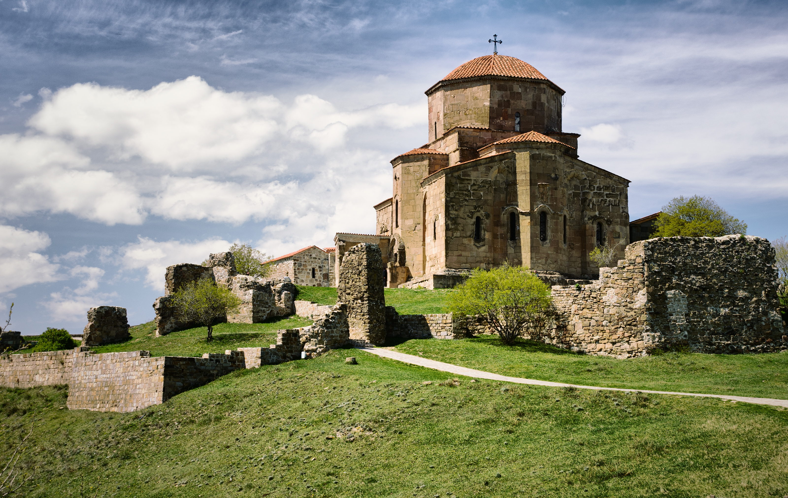 ჯვრის მამათა მონასტერი. მცხეთა, საქართველო